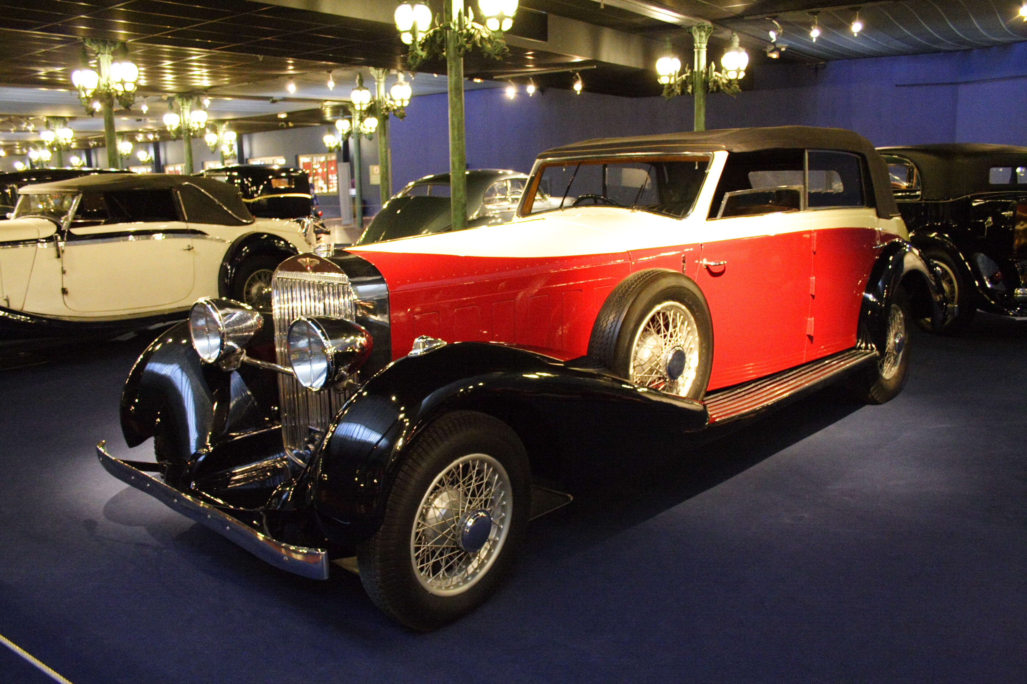 Hispano-Suiza Cabriolet J12 1934 at the Musée National de l'Automobil(Mulhouse, France)